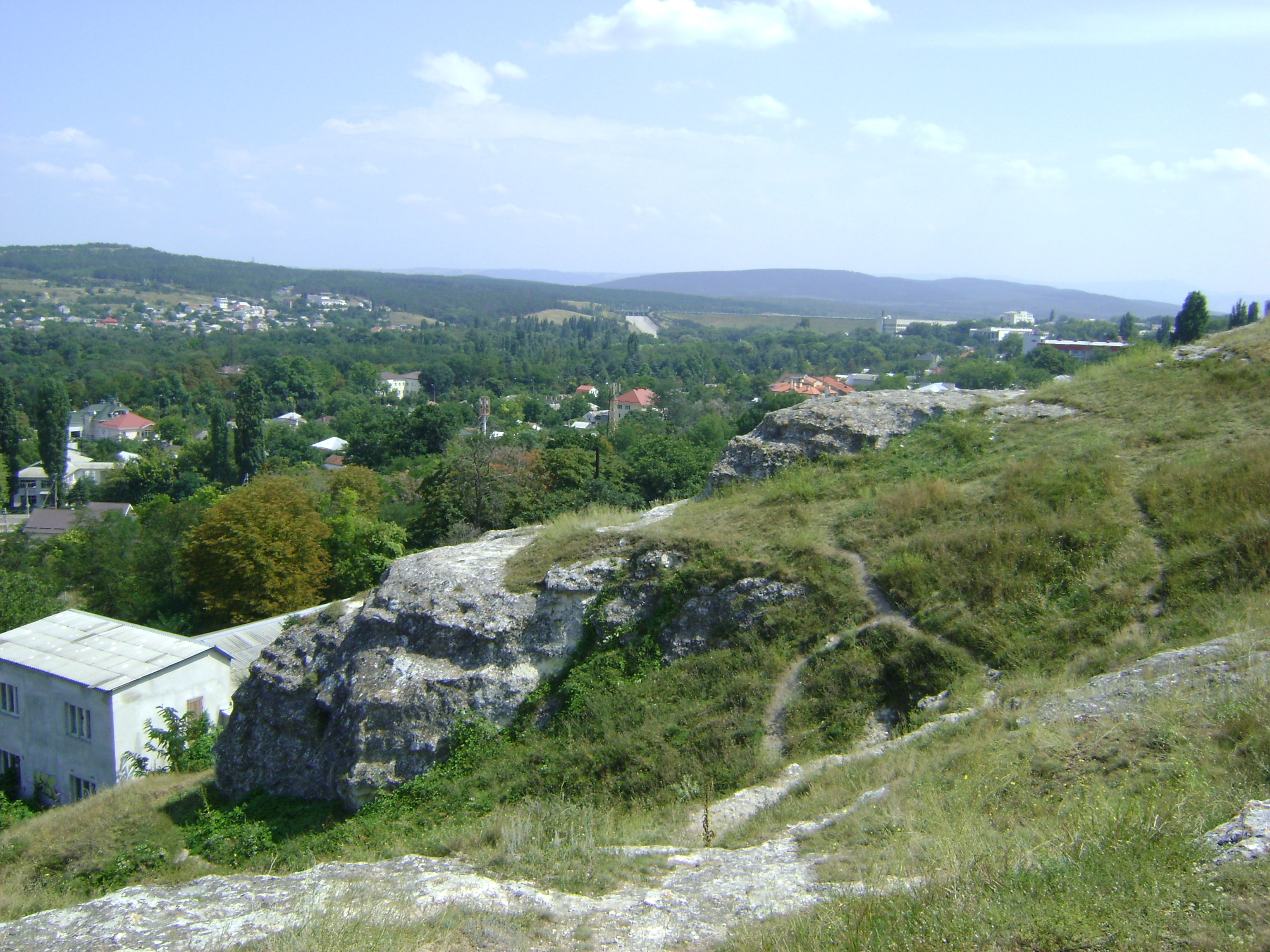 Неаполь Скіфський.